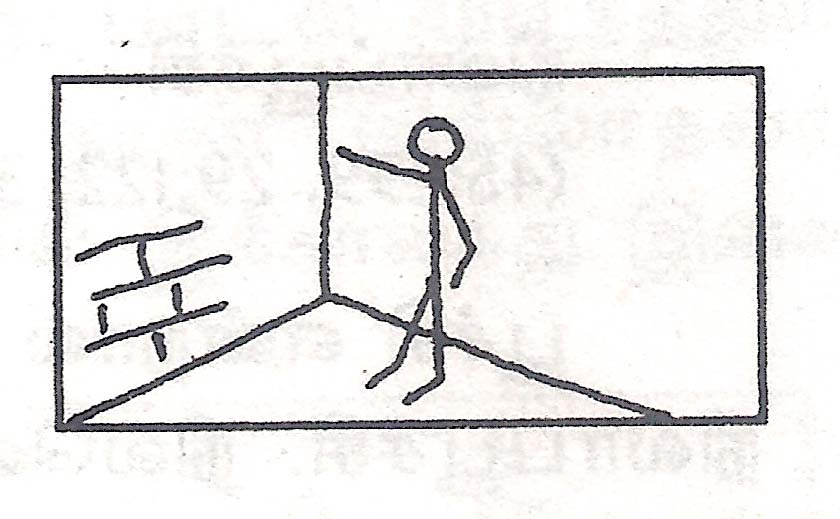 நாலுமூலை விளையாட்டு கோட்டுருவப் படம். மறைகின்ற விளையாட்டுகள் என்னும் எனது நூலிலிருந்து எடுத்துப் பதிவேற்றப்பட்டது.